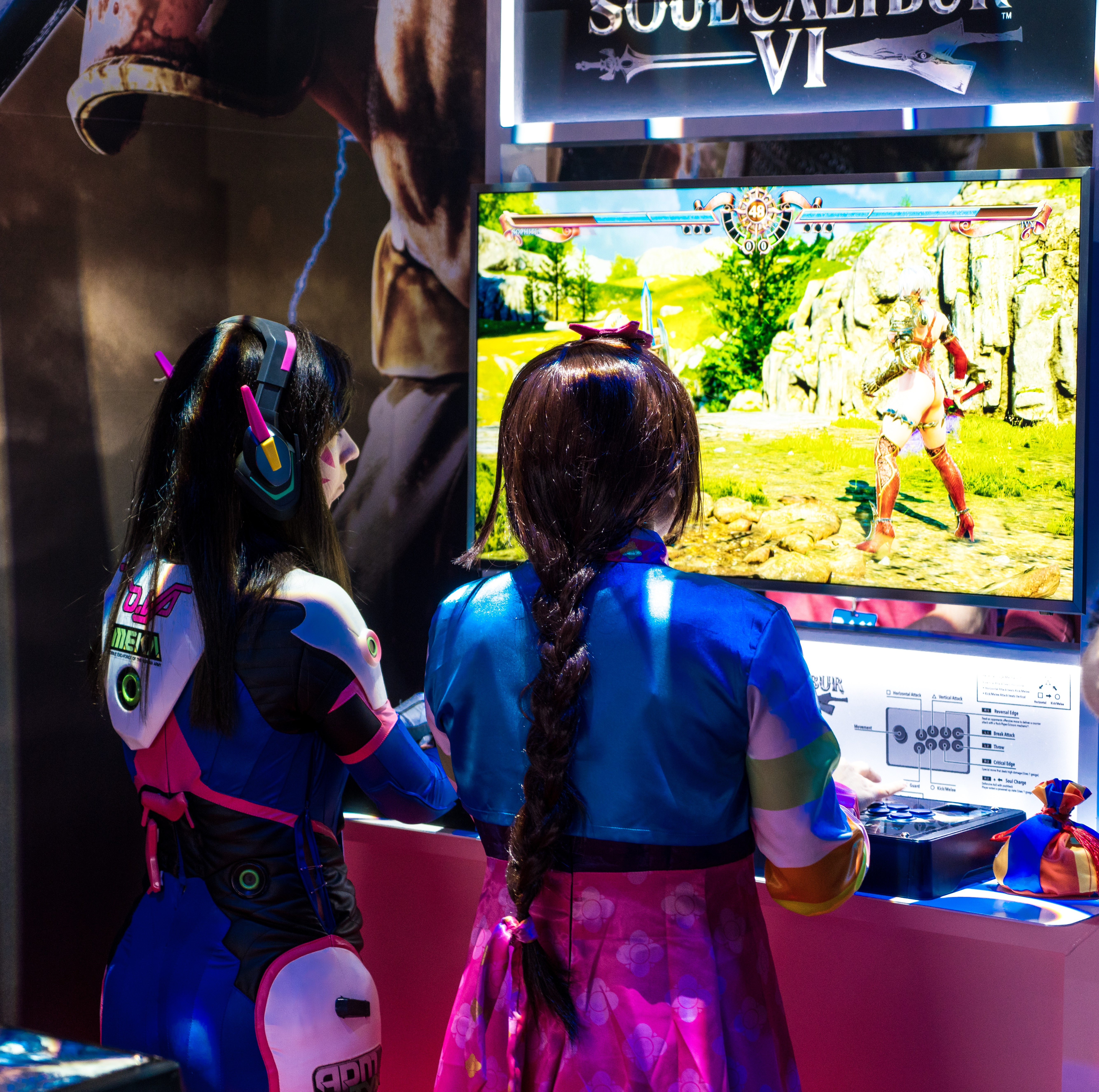 PAX West 2018